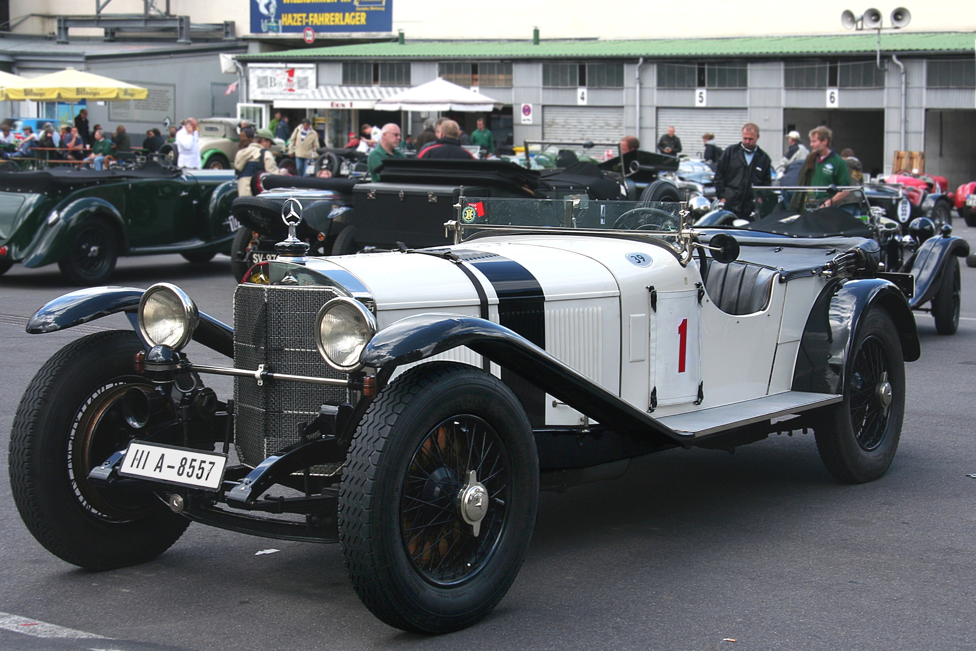 Mercedes-Benz S, Baujahr 1927